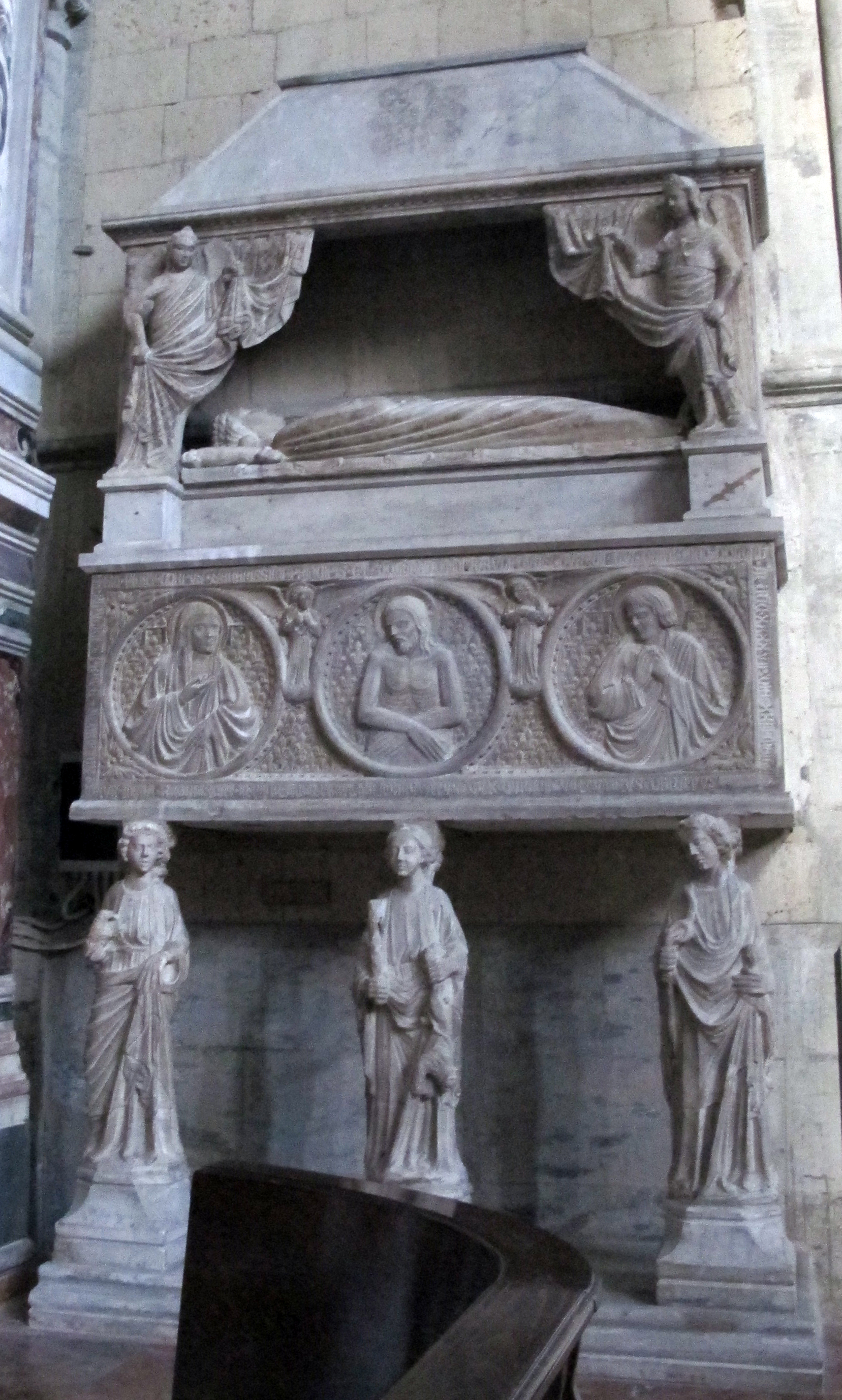 Napoli